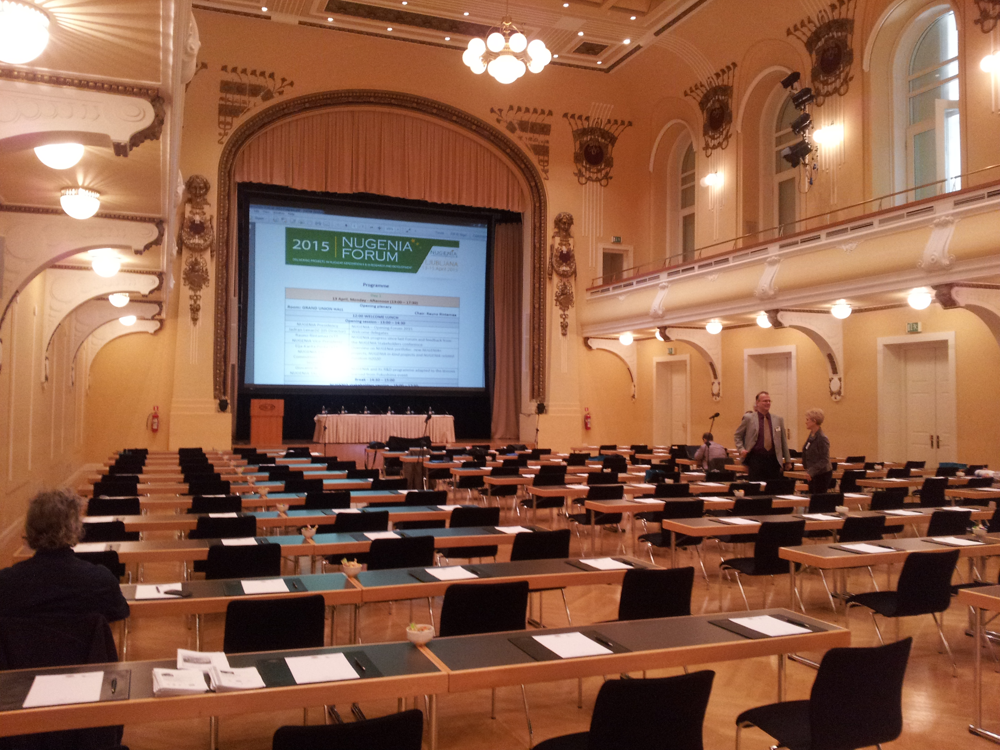 zahajeni Fora 2015